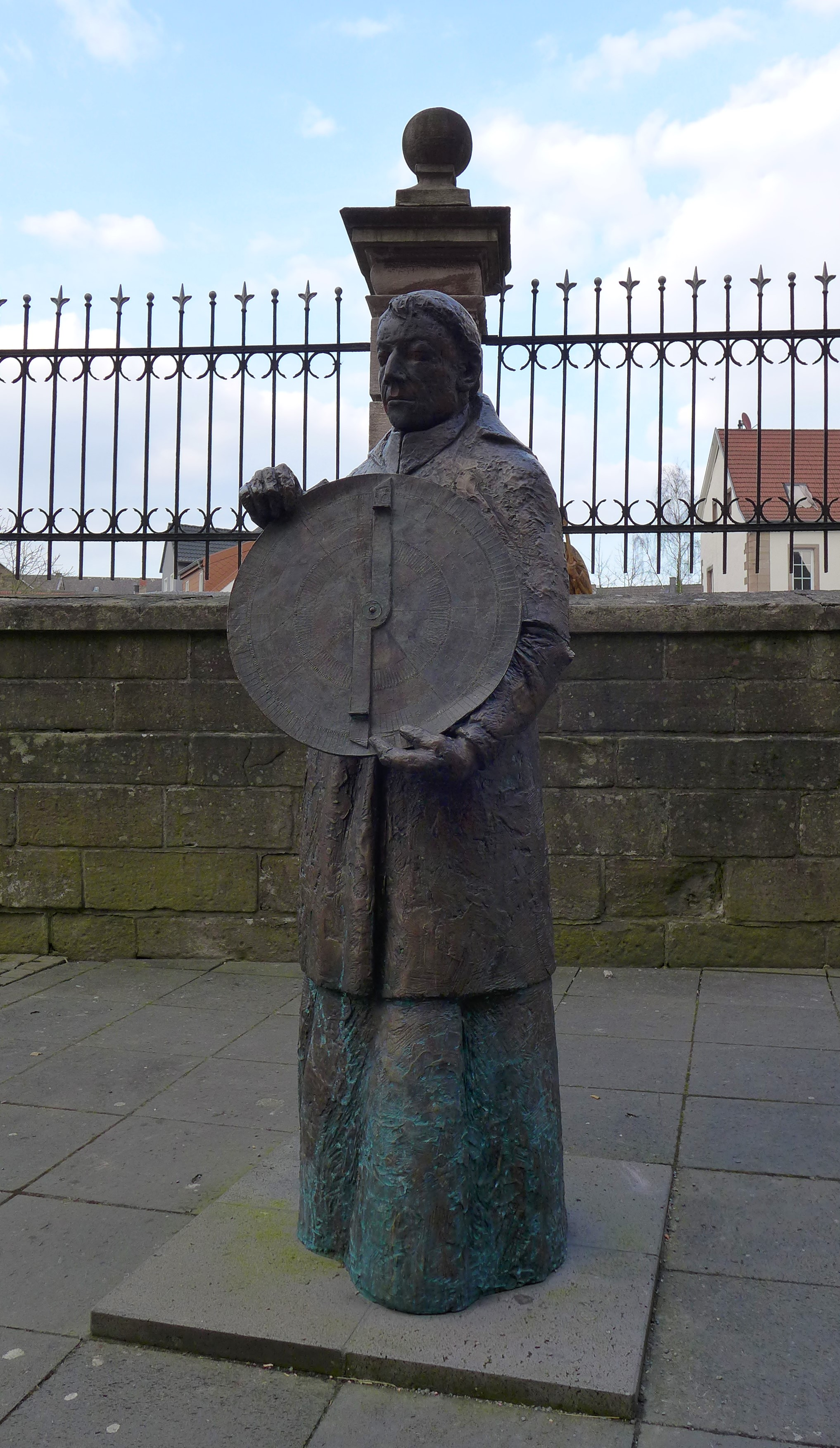 Nikolaus von Kues, Bronzeplastik von Kurt Tassotti am Wendelsdom in St. Wendel